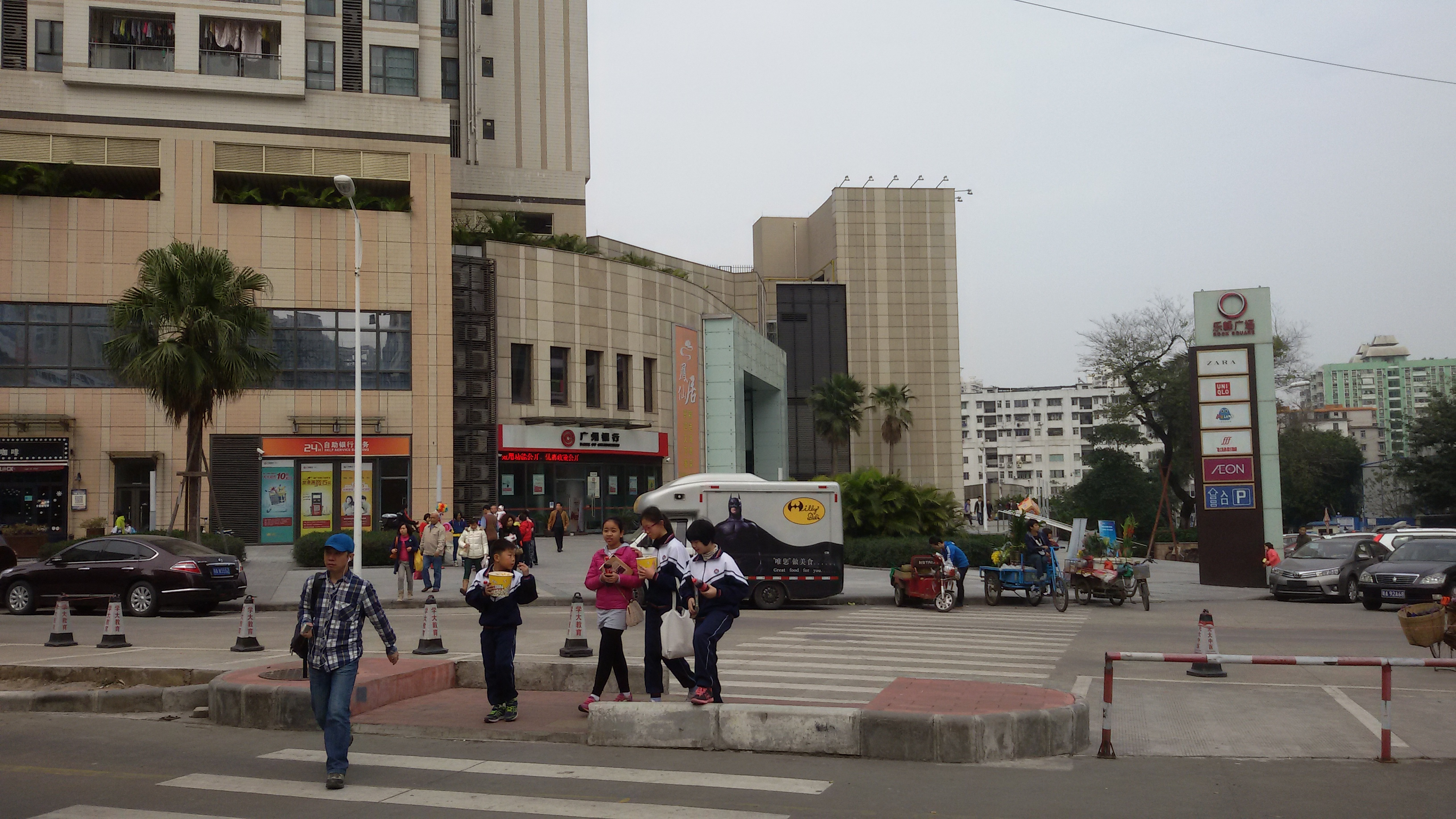 粵語: 乐峰广场西南门